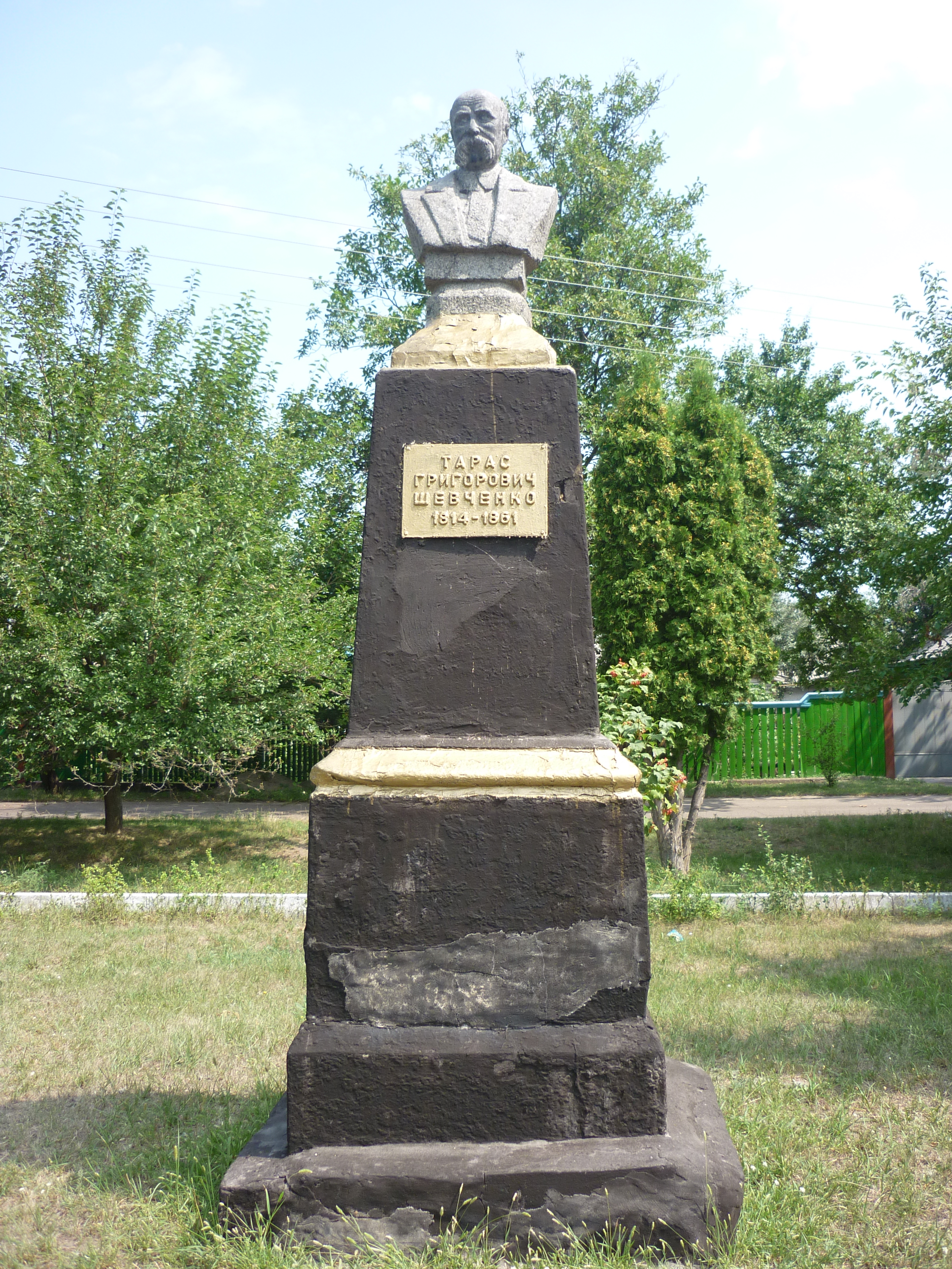 село Леськи Черкаського району Черкаської області, Україна